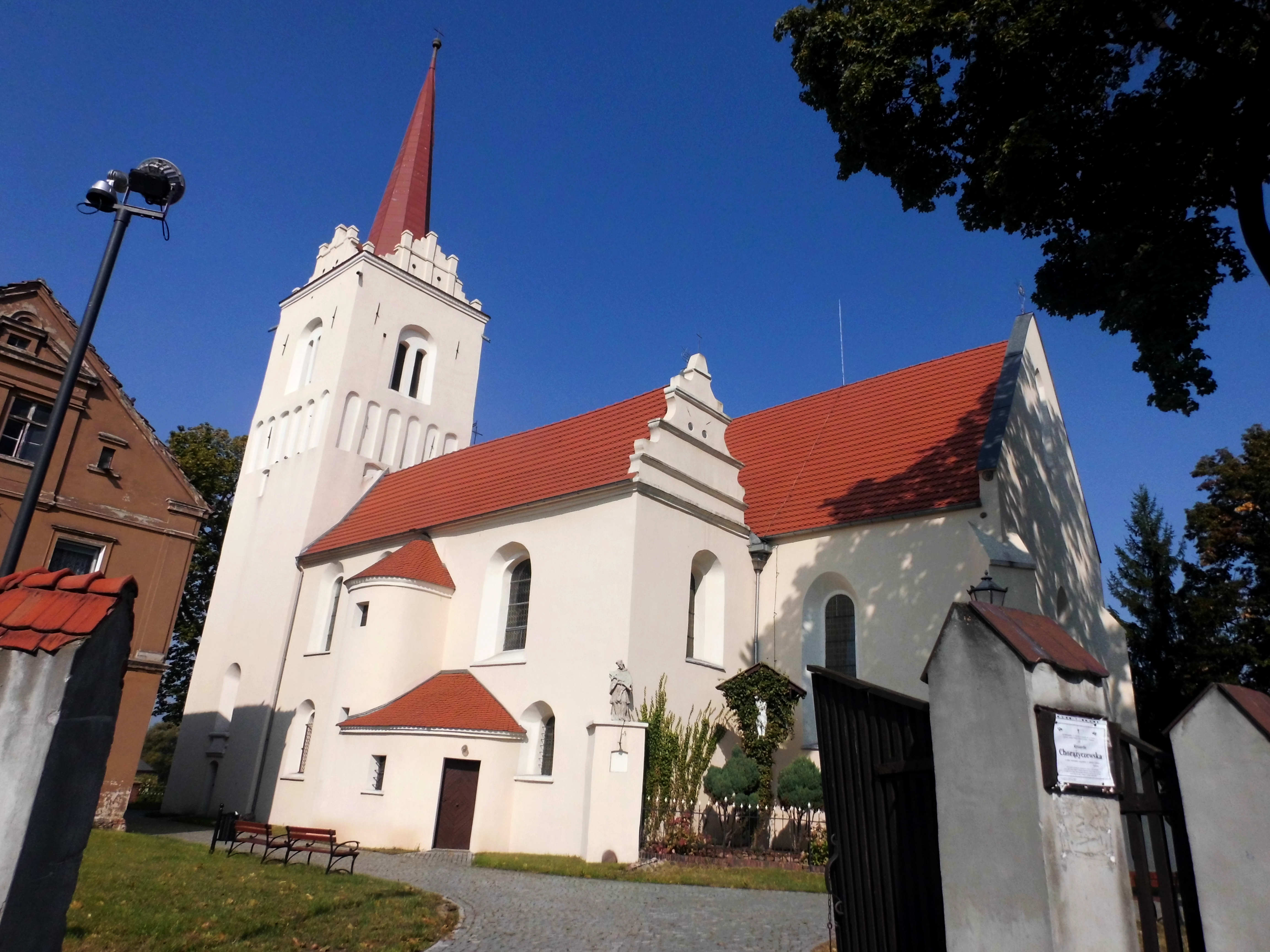 Nowe Miasteczko - kościół parafialny p.w. św. Marii Magdaleny, mur., XIV, XV/XVI w.